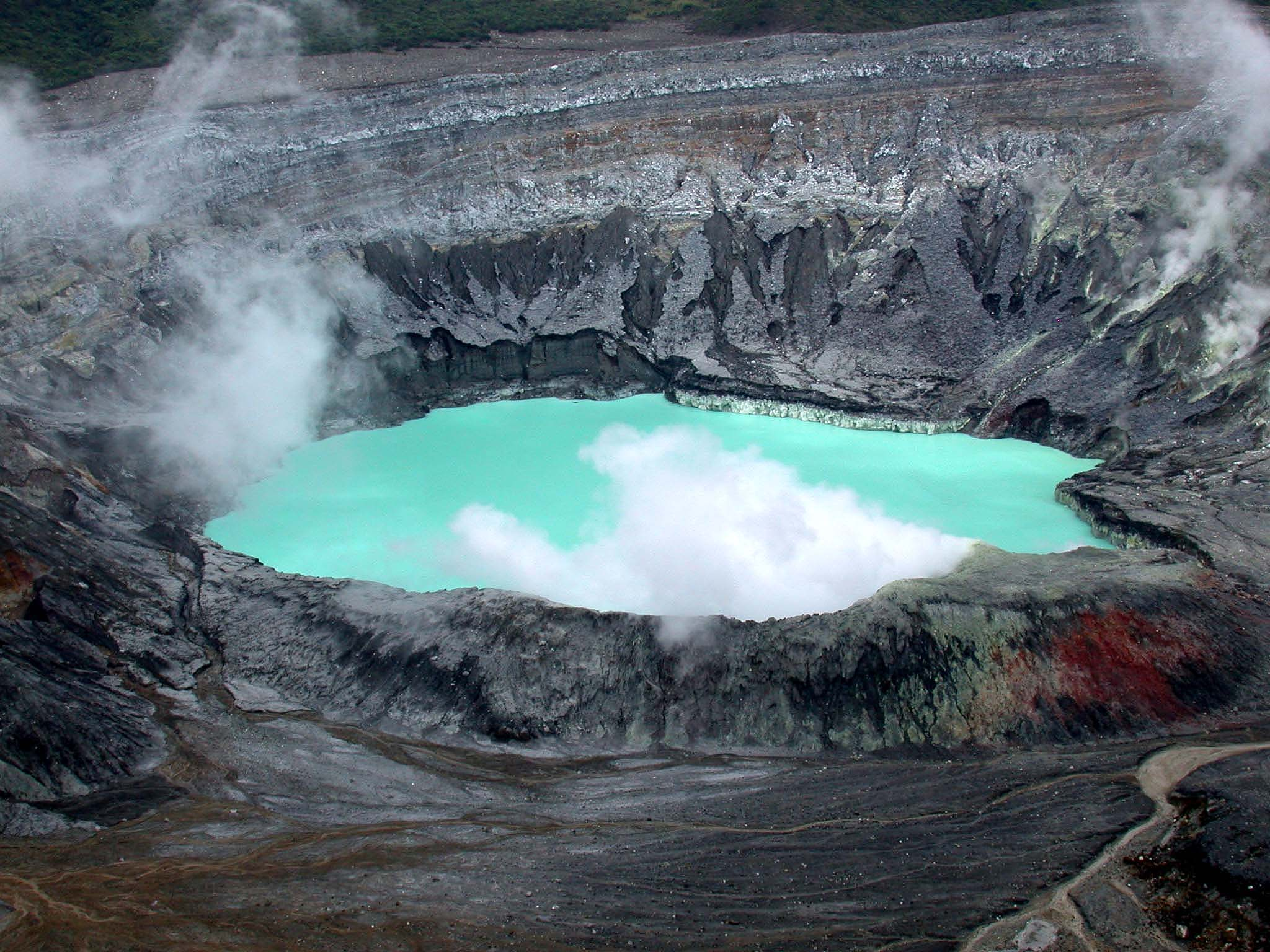 Volcan Poas, Costa Rica